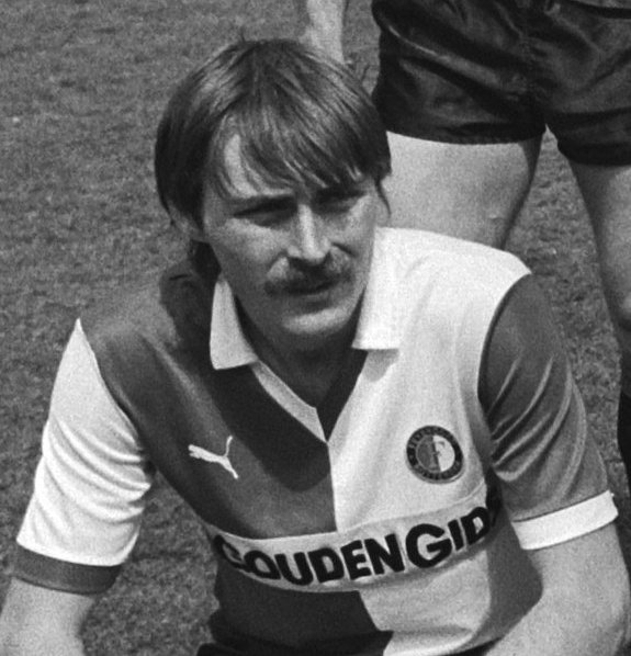 Feyenoord tegen PEC, met afscheid Johan Cruijff ; elftalfoto. Staande, van links naar rechts: André Hoekstra, André Stafleu, Ruud Gullit, Ben Wijnstekers, Joop Hiele, Johan Cruyff. Voorste rij, van links naar rechts: Ivan Nielsen, Henk Duut, Peter Houtman, Michel van de Korput, Stanley Brard.